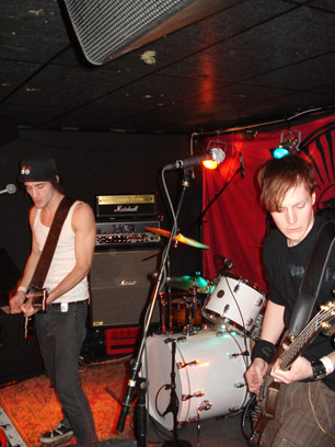 Crang